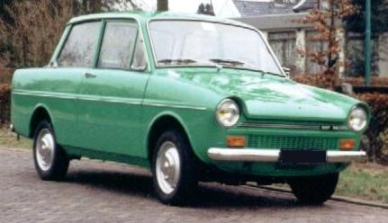 Daf 33, Dit model is van 1973 en heeft de kleur Averto.